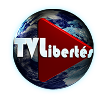 Logo officiel de la chaîne TV Libertés.